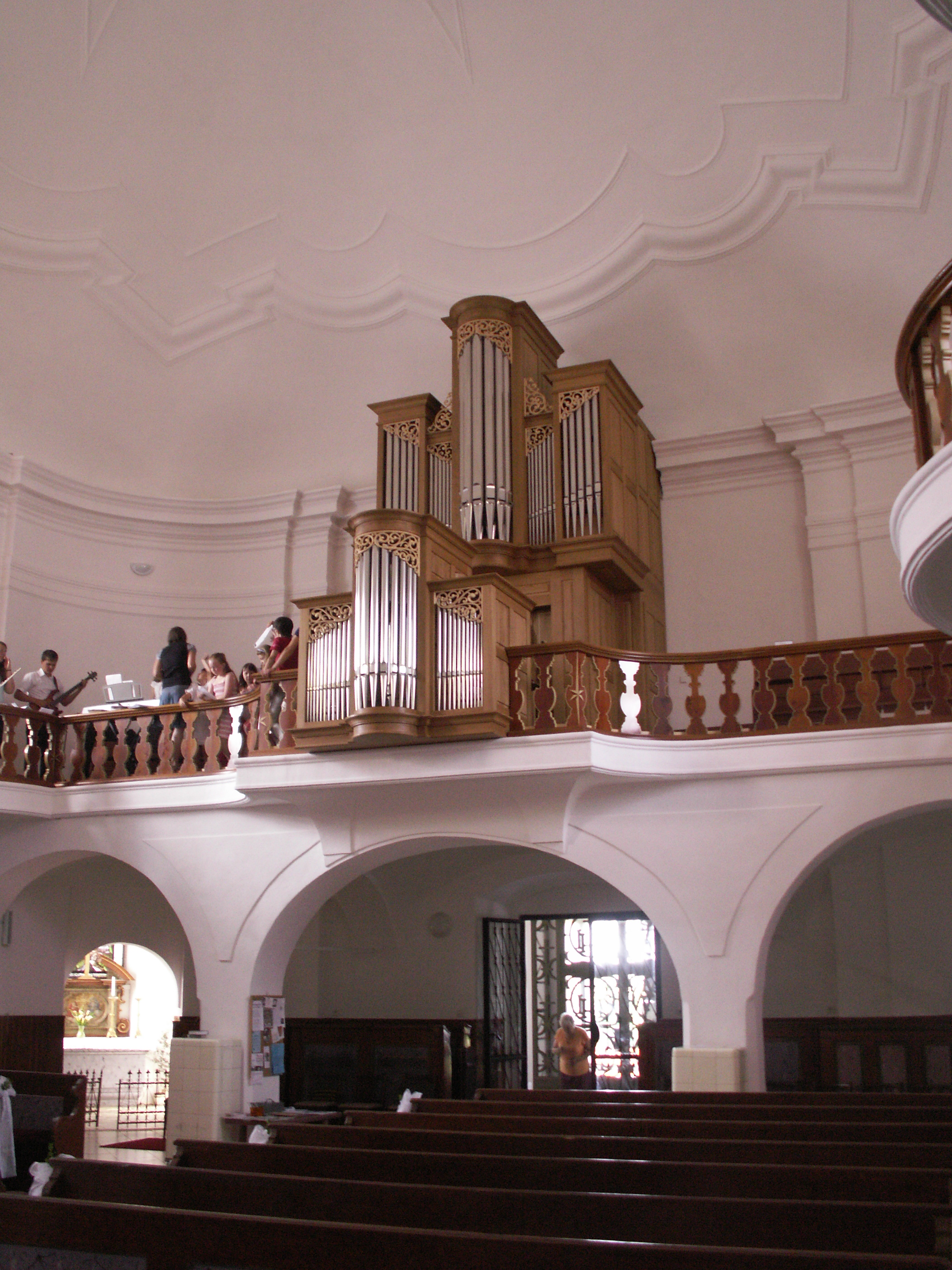 Obyčtov, okres Žďár nad Sázavou, kraj Vysočina, interiér kostela Navštívení Panny Marie (Santini)